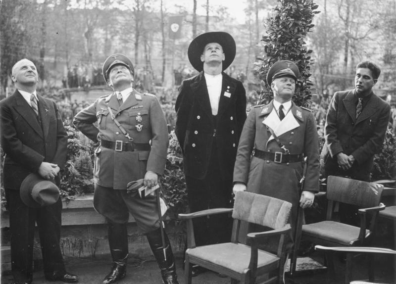 Scherl: Richtfest des neuen Reichsluftfahrtministeriums in Berlin am 12. Oktober 1935. vlnr: Der Baumeister Prof. Dr. Ing. [Ernst] Sagebiel, Reichsluftfahrtminister General der Flieger Hermann Göring, der Zimmerpolier Franz Hecht, der den Richtspruch sprach, Staatssekretär [Erhard] Milch beobachten das Hochziehen der großen Richtkrone. 33689-35